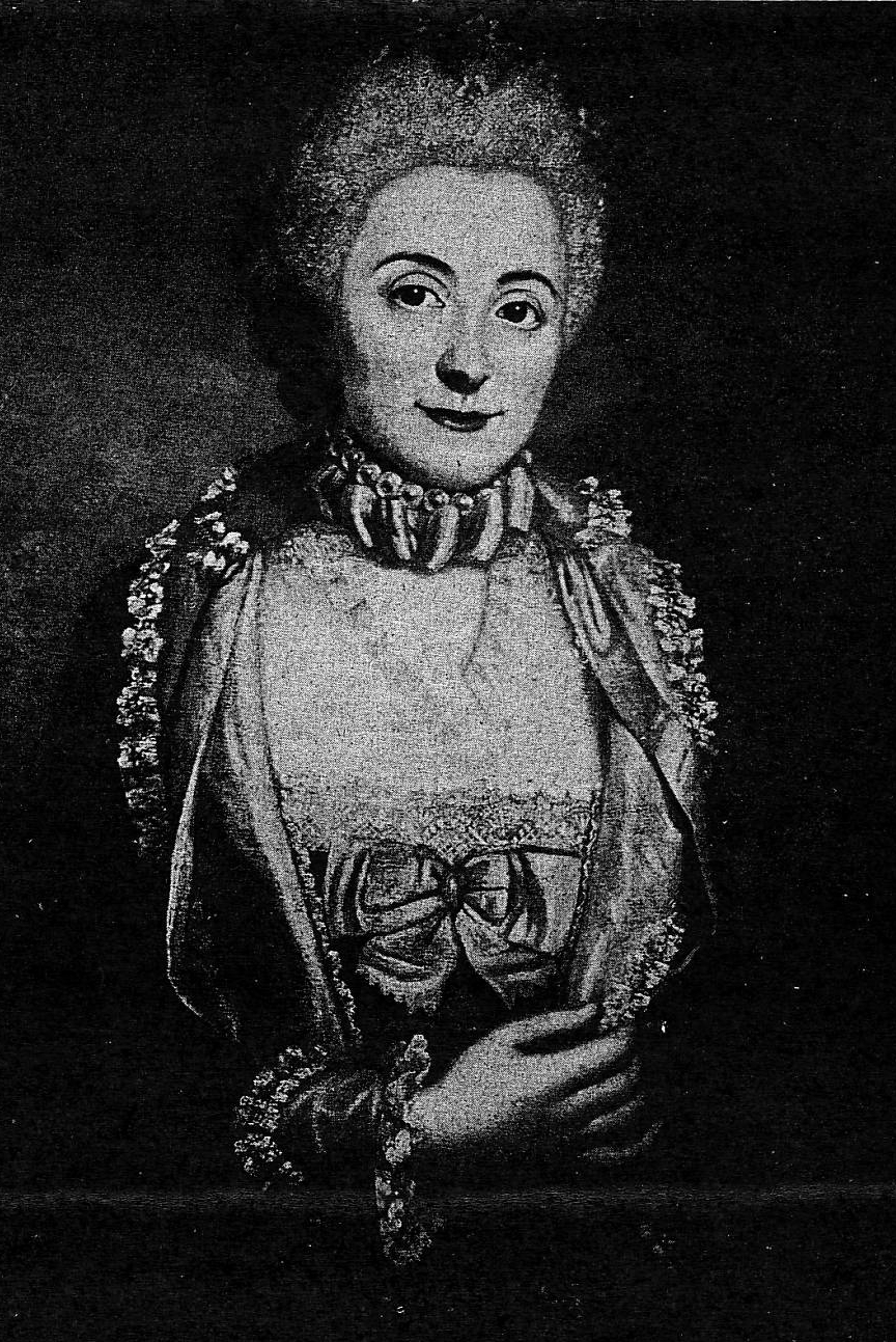 Philippine Jakobea Sandrart (1740-1803), Magdeburg Frau des Bürgermeisters Georg Philipp Dohlhoff, Mutter des Hofpredigers Georg Peter Dohlhoff